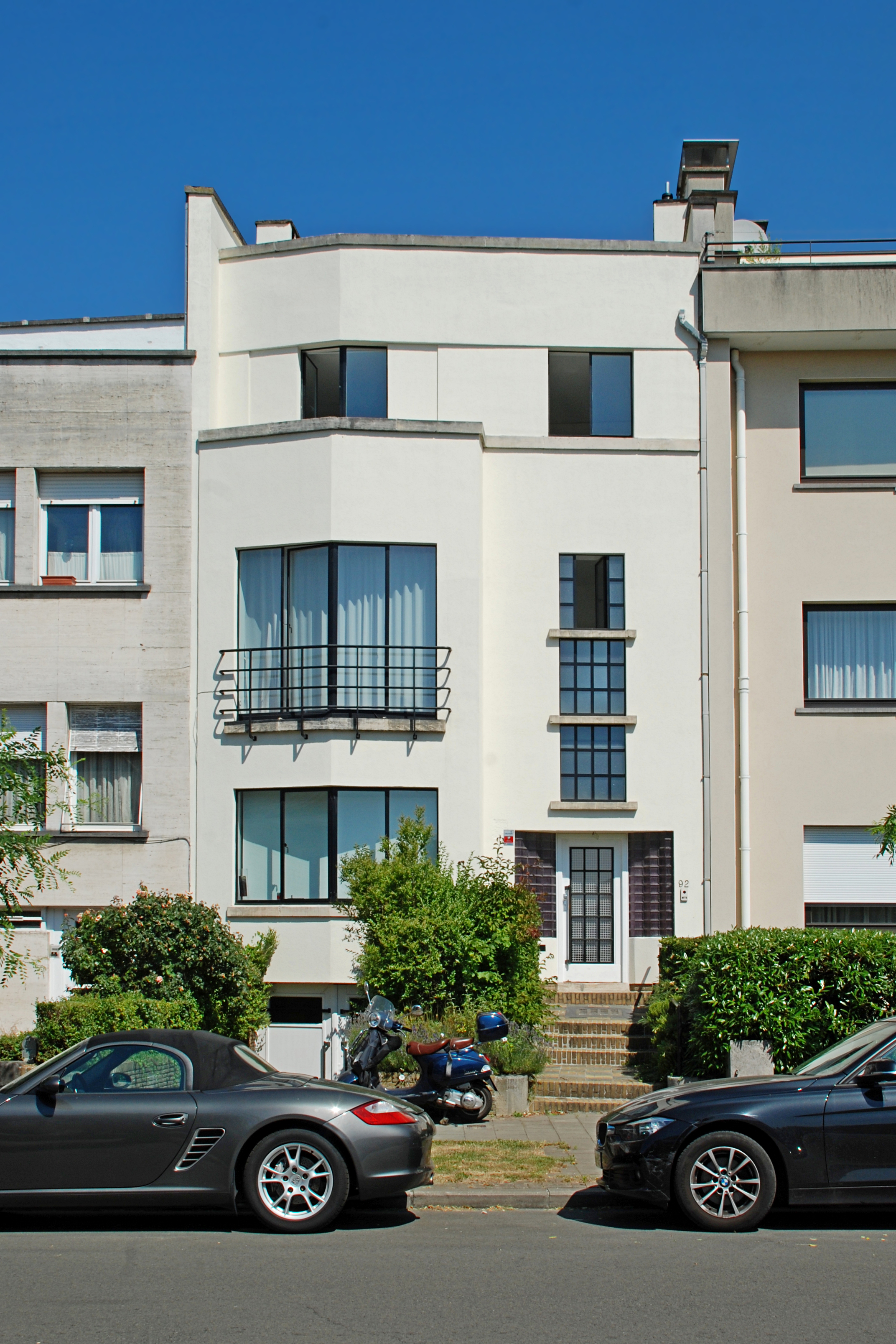 Belgique - Bruxelles - Woluwe-Saint-Pierre - Maison-atelier du peintre Jean Borin (modernisme - architecte Jacques Obozinski - 1932)